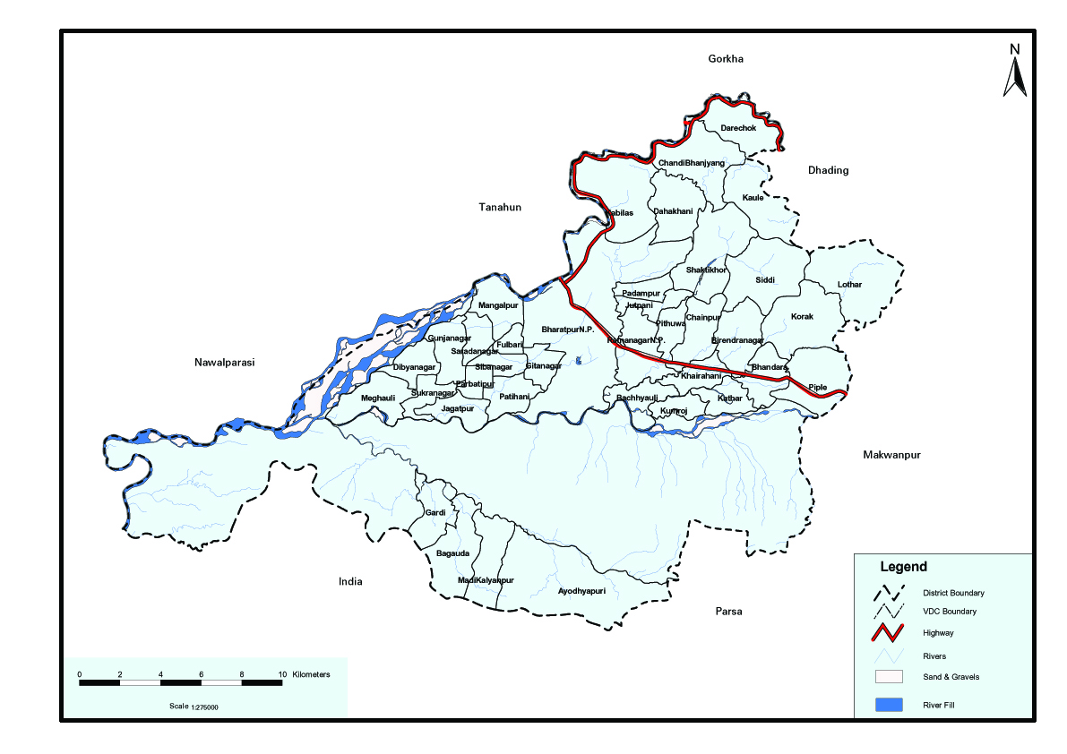 नेपाली: चितवन जिल्लाको नक्शा